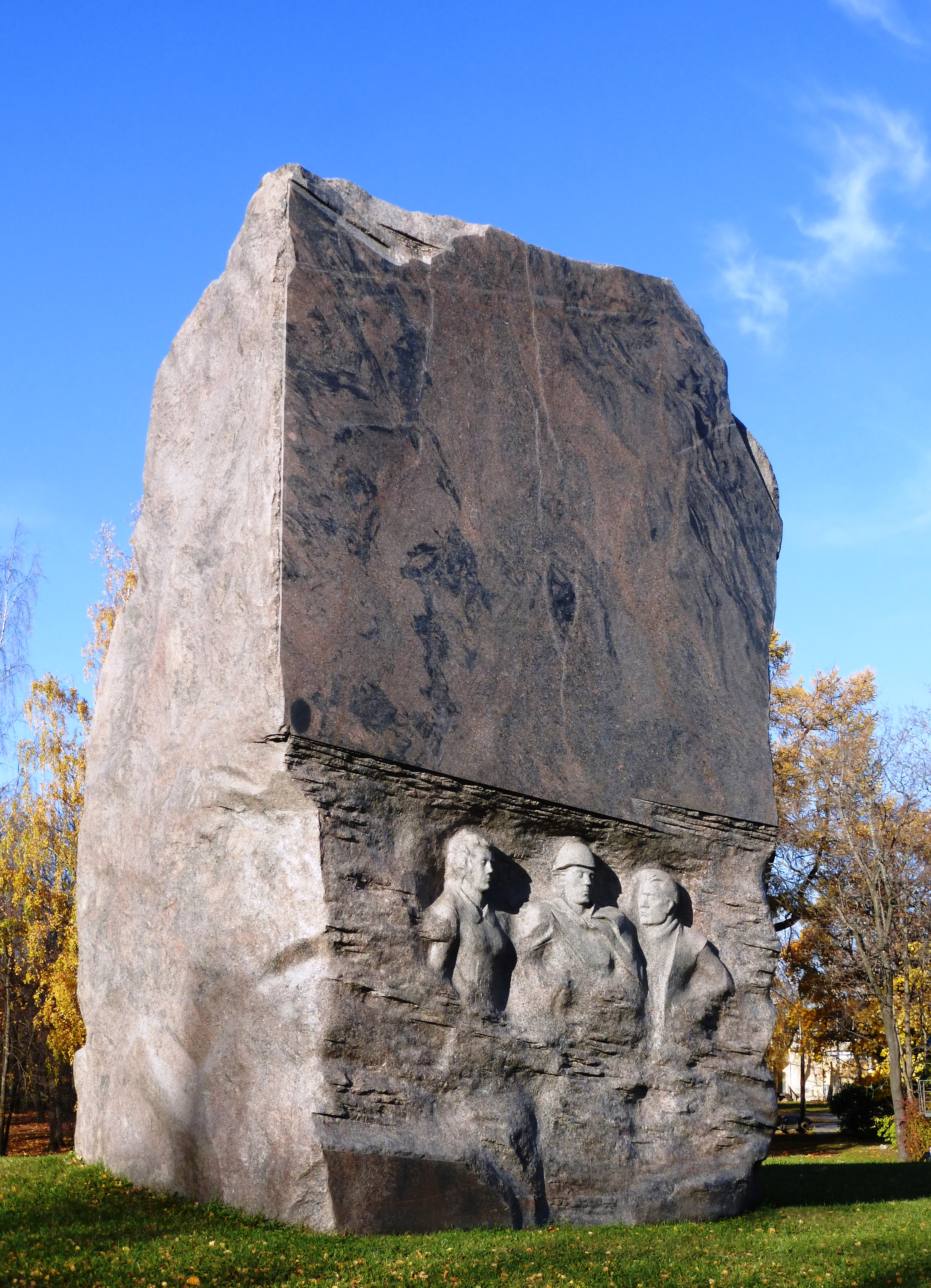 Фрагмент военно-мемориального комплекса Карельского фронта «Аллея памяти и славы» в Петрозаводске. Памятник карельским партизанам и подпольщикам,участникам Великой Отечественной войны. Памятник установлен в Петрозаводске на пересечении улиц Ф.Энгельса и Гоголя. Открыт 22 июня 2003 года, скульптор Э.С.Григорян